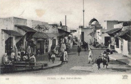 Rue Sidi El Béchir, Tunis, Tunisie